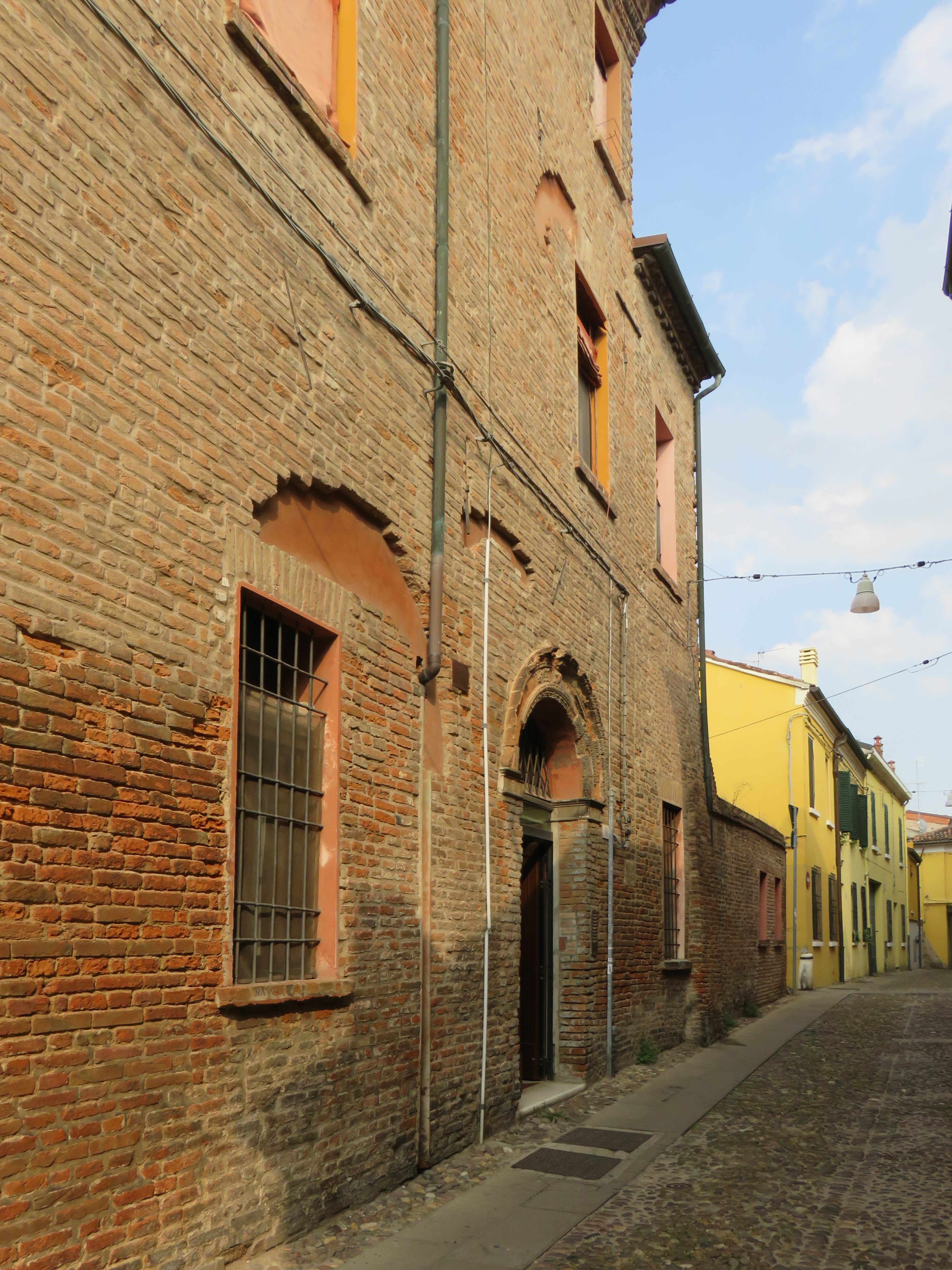 Via Capo delle Volte, a Ferrara. Particolare.